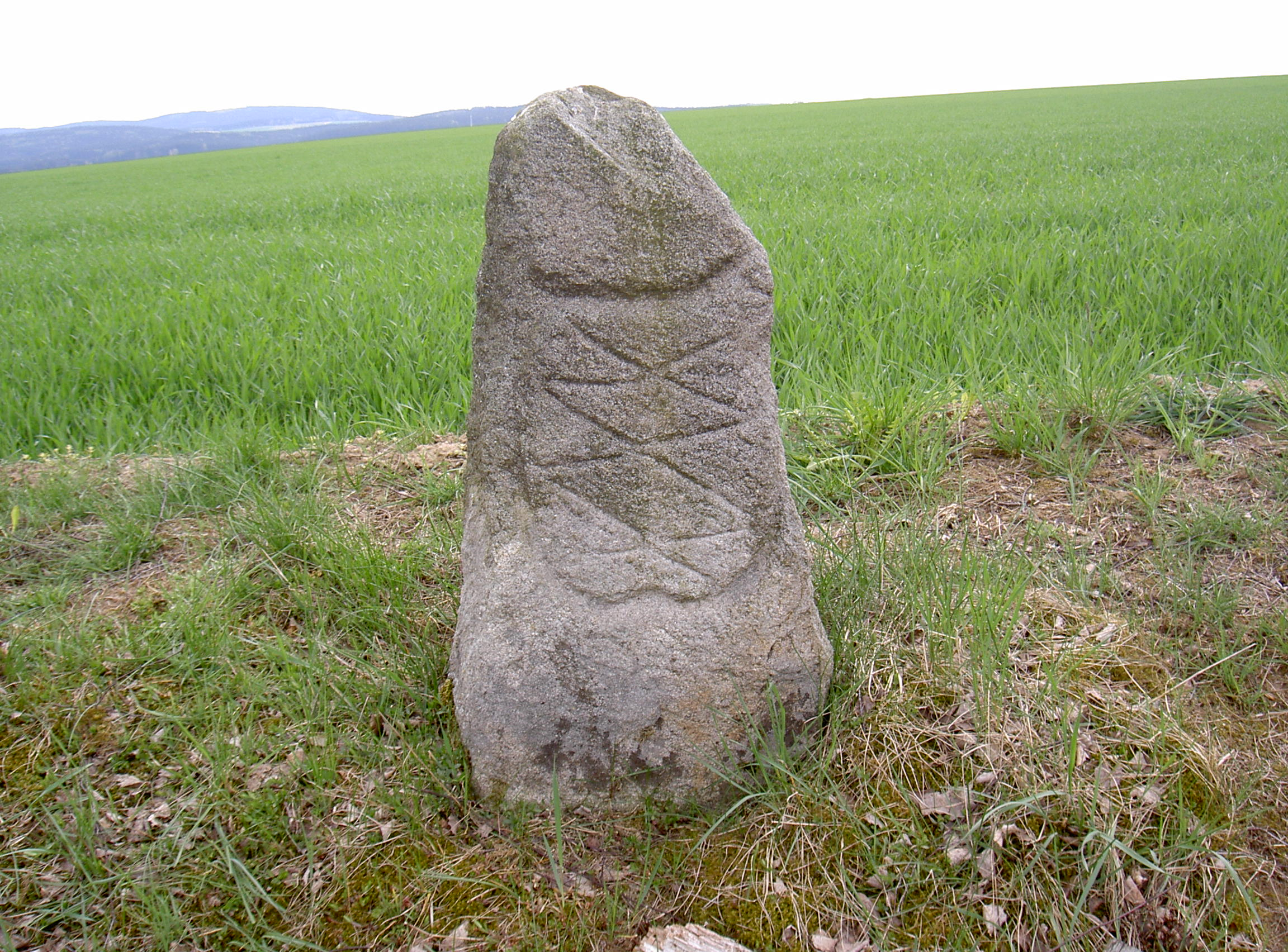 Grenzstein Braunetsried westlich Hartwichshof